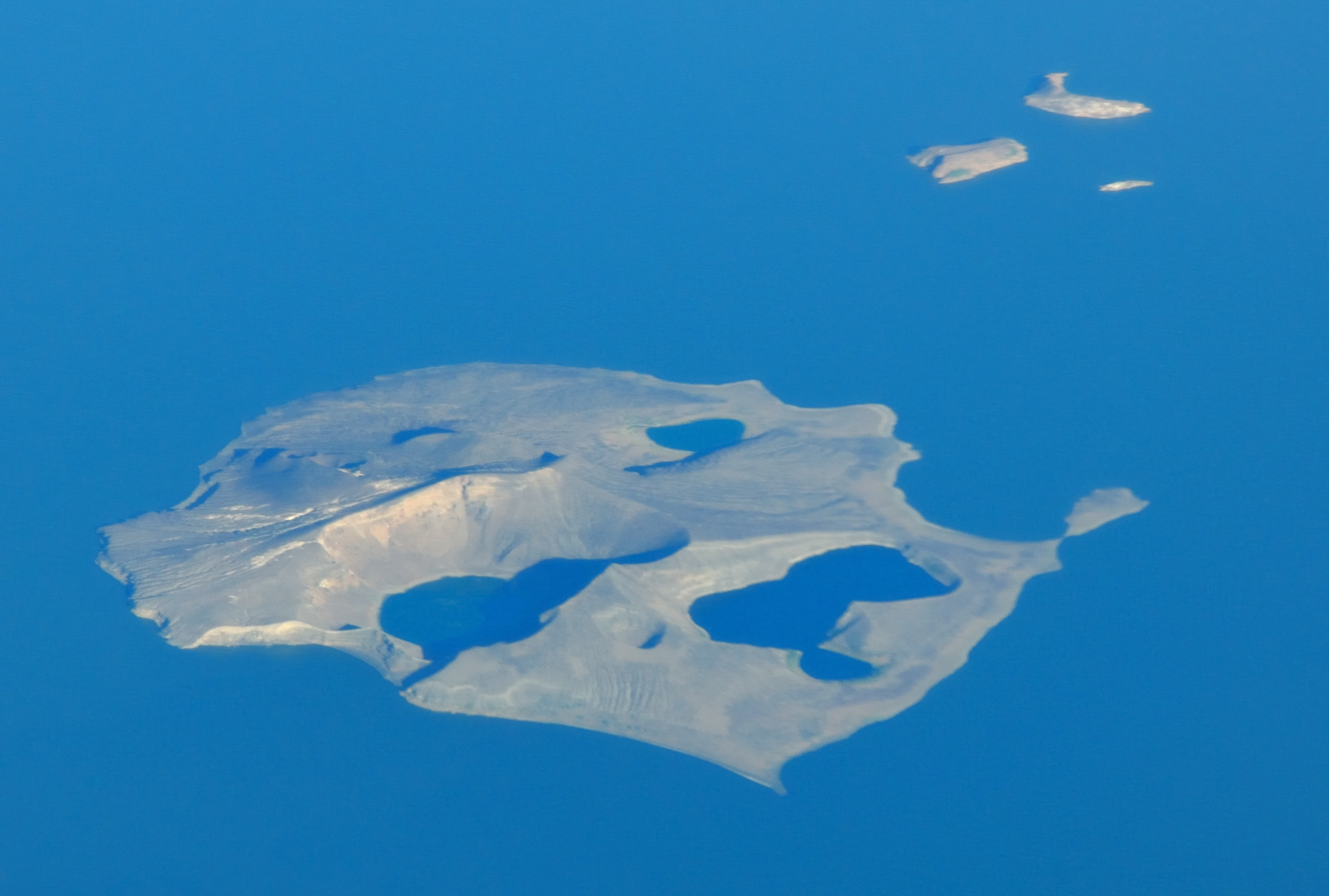 Kenya, Central Island in Lake Turkana